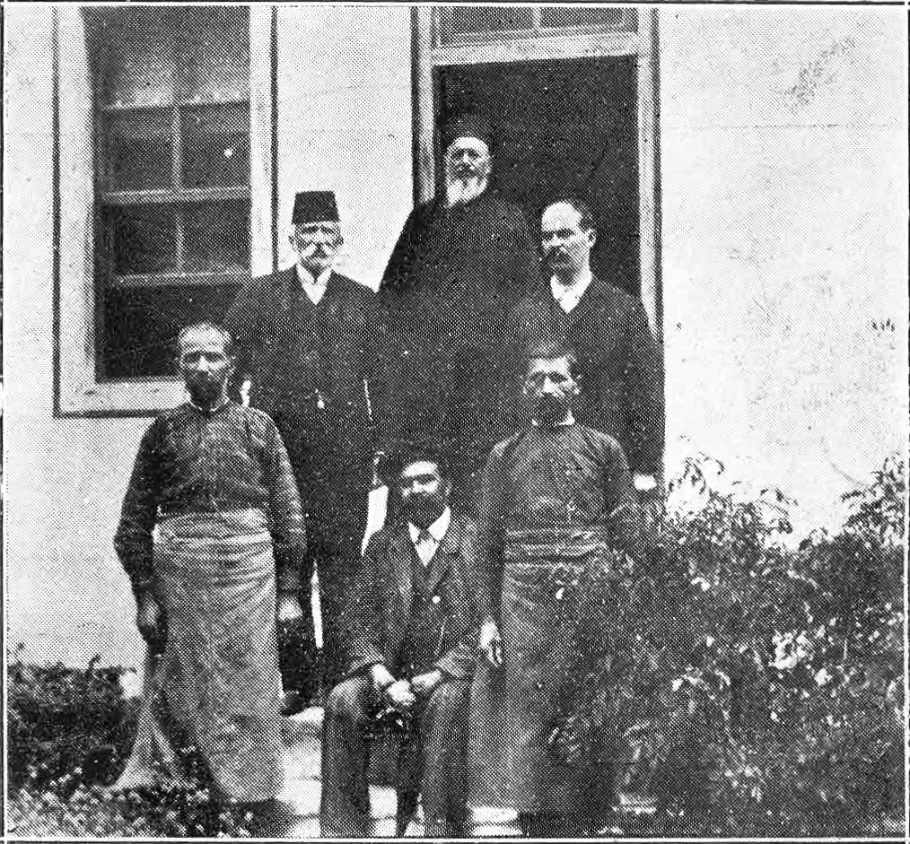 Поп Гьошо Михайлов - вляво от него с феса Драндаров